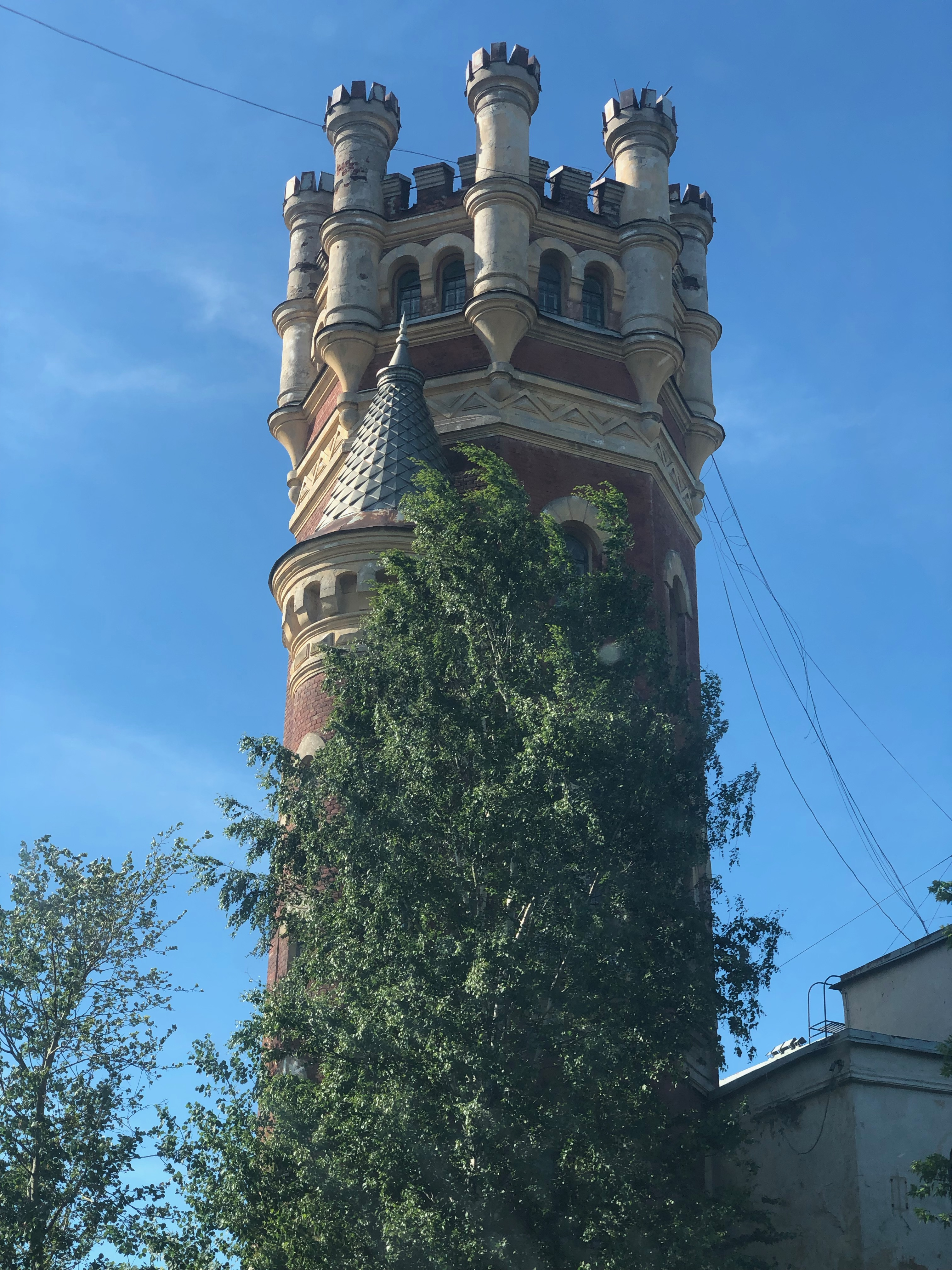 Водонапорная (Пристрельная ) башня Обуховского завода